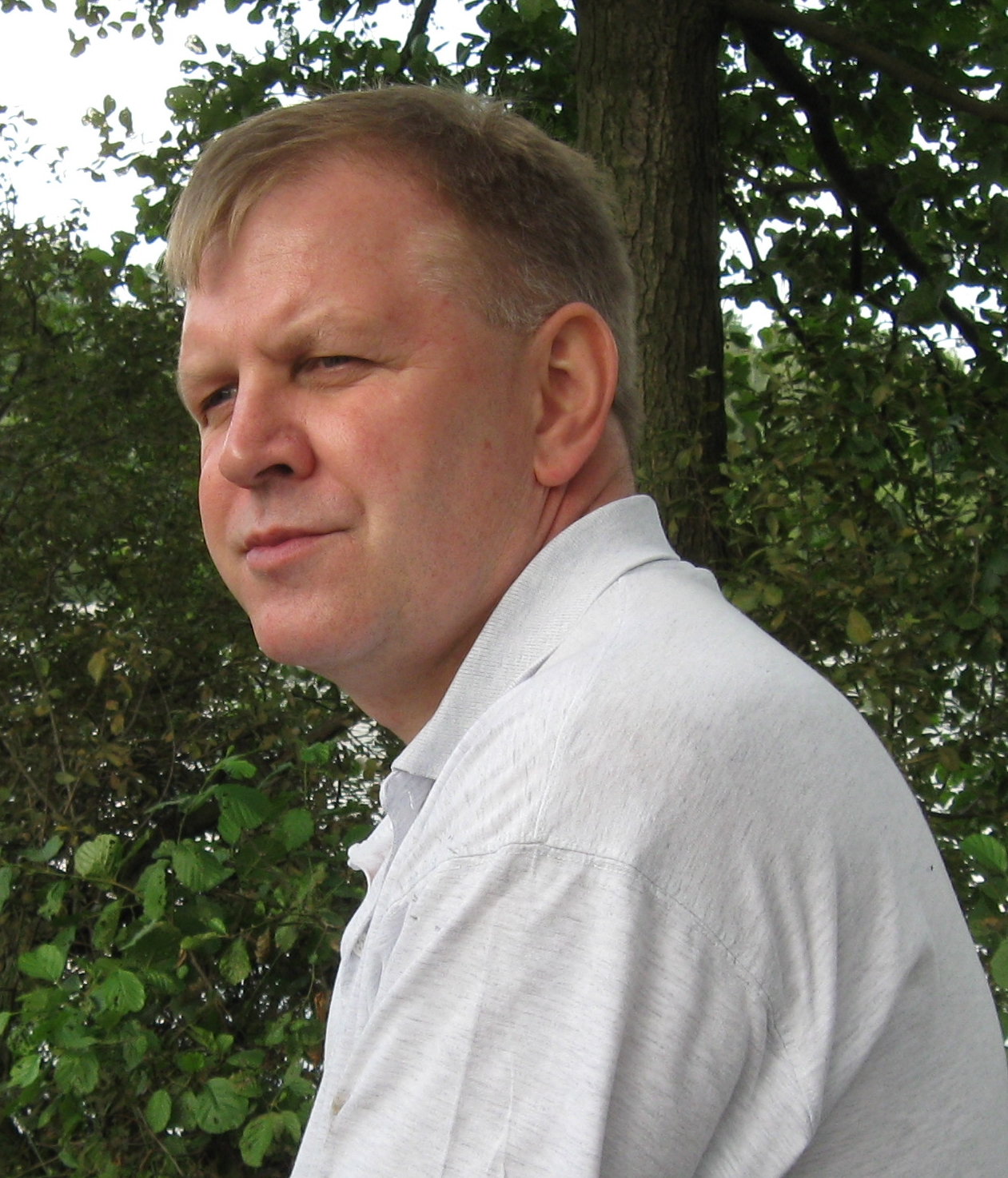 Zdzisław Kruszyński